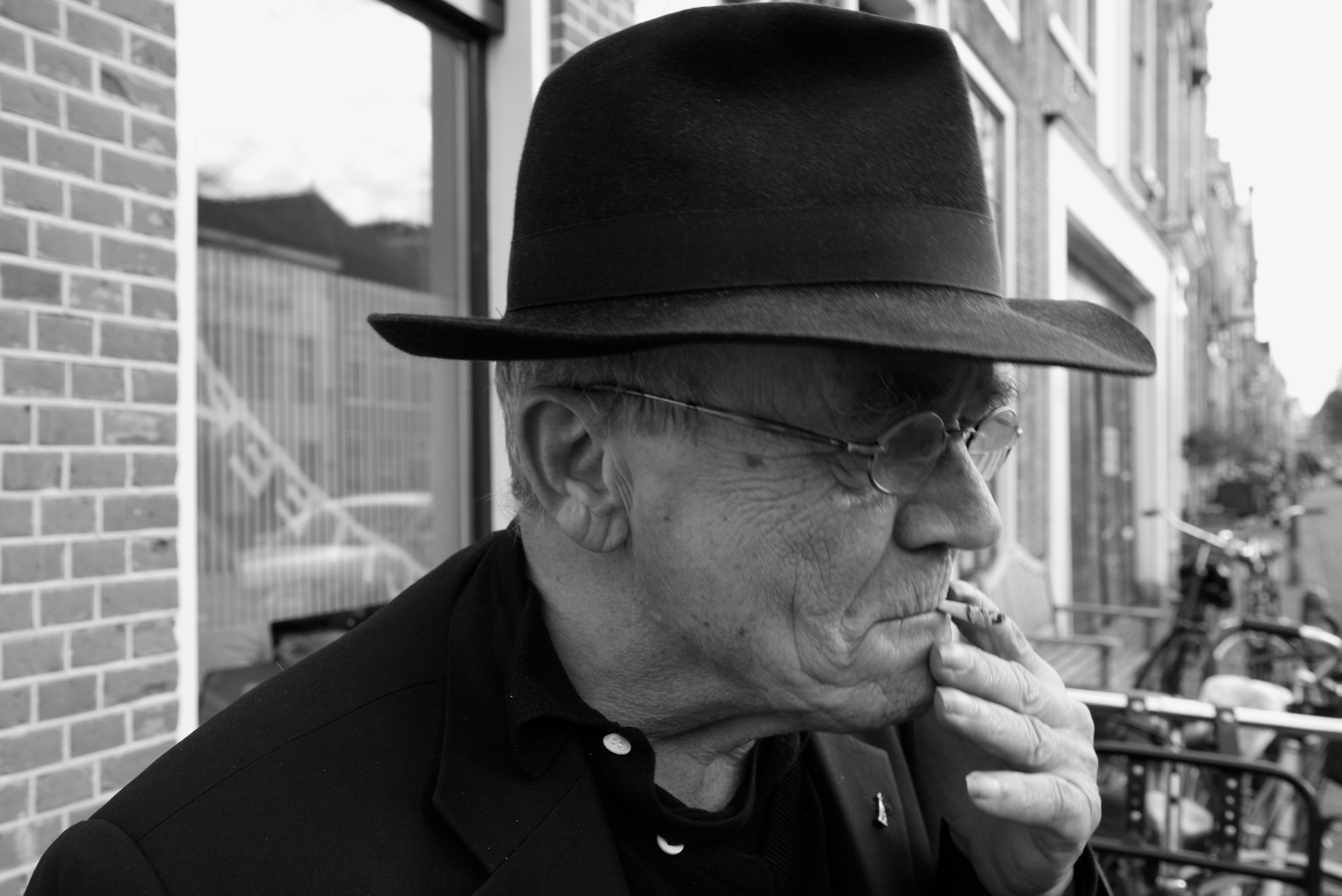 Nederlands animator